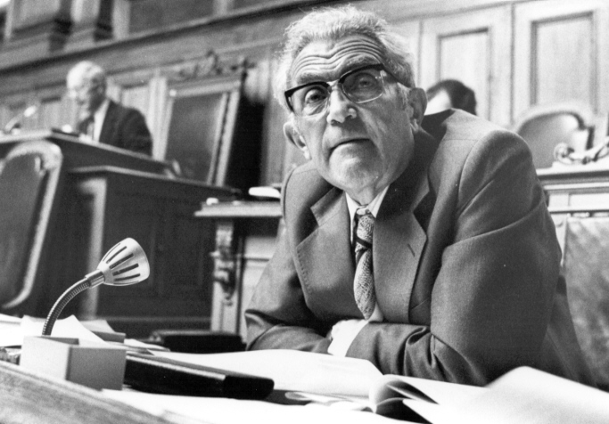 Schweizer Bundeskanzler